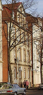 Ausschnitt aus unten genannter Quelle